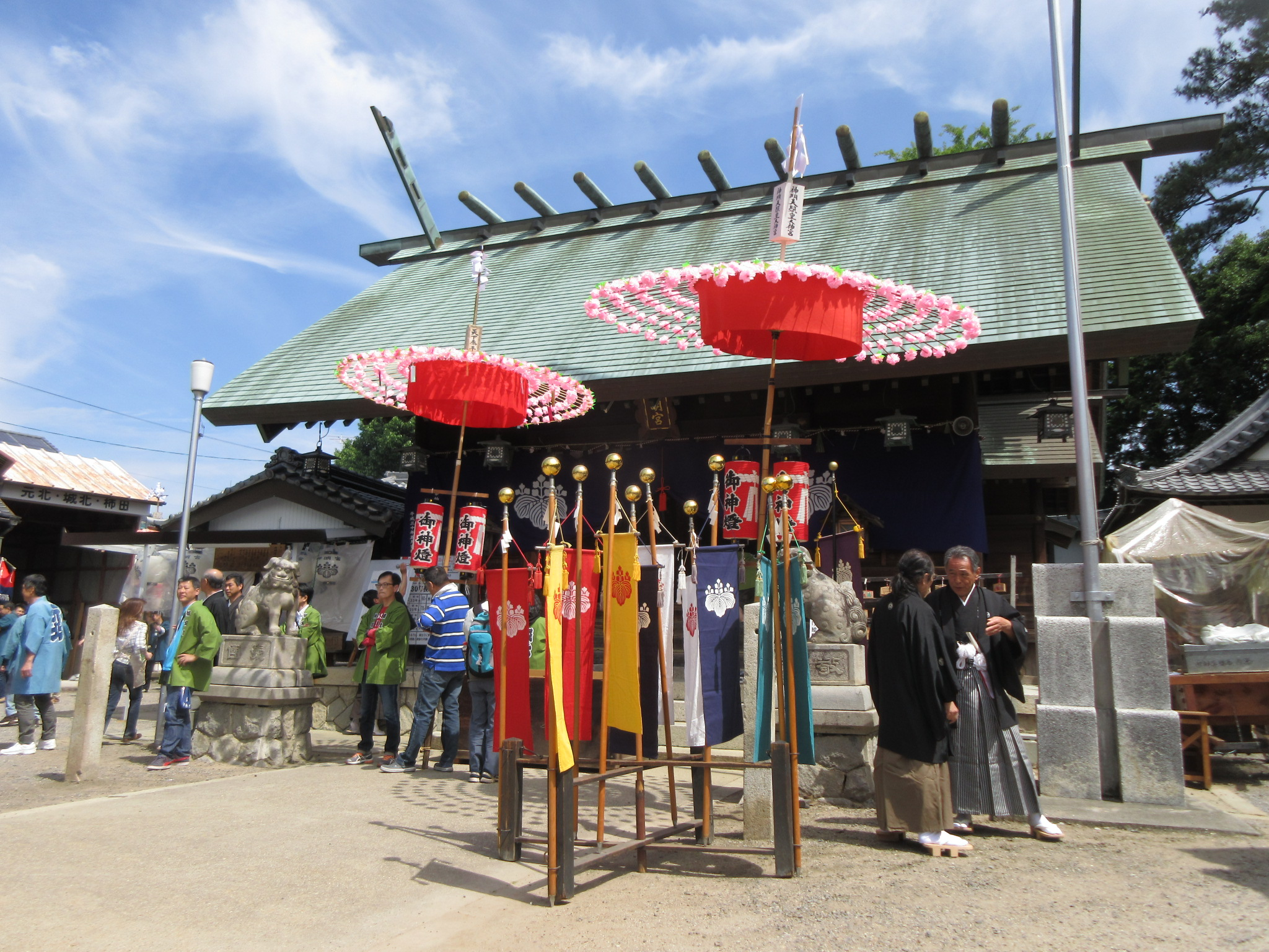 能見神明宮（岡崎市元能見町）